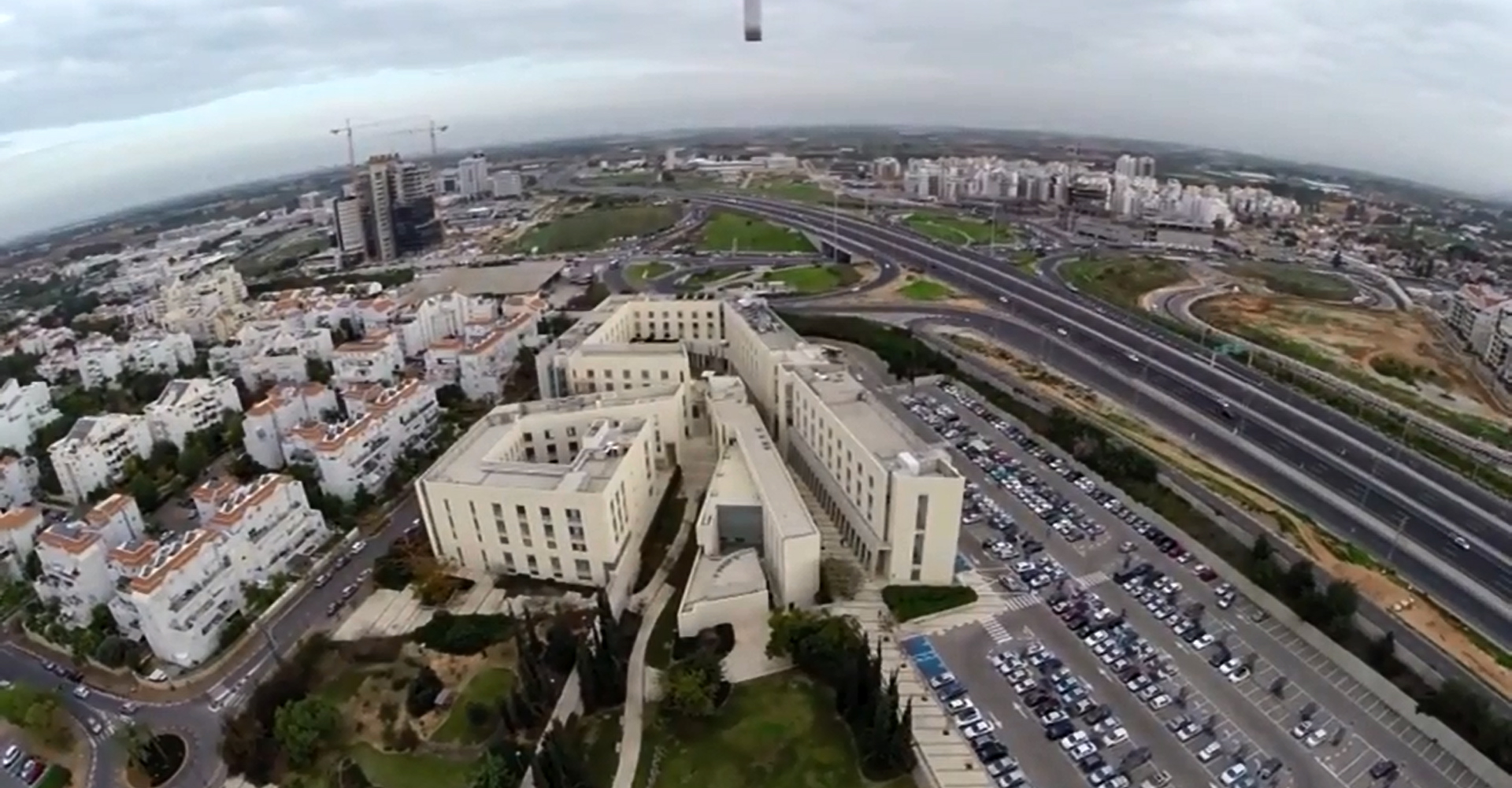 קמפוס האוניברסיטה הפתוחה ע"ש דורותי דה רוטשילד ברעננה